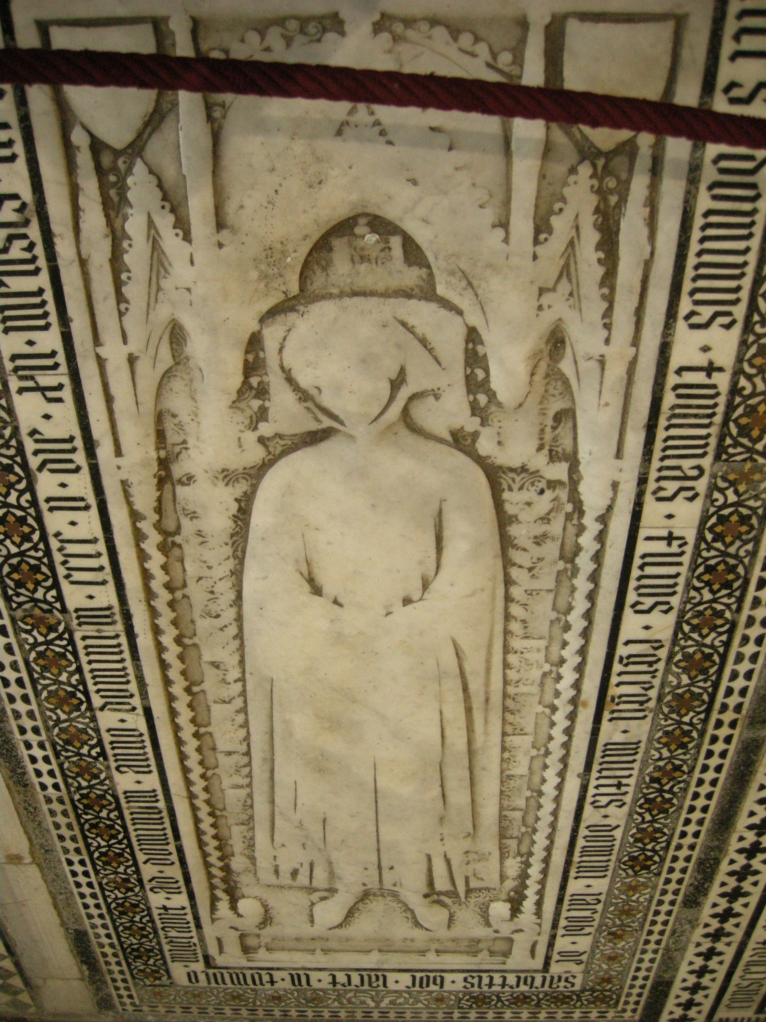 lastra tombale di Tommaso Sacchetti, bottega del Ghiberti